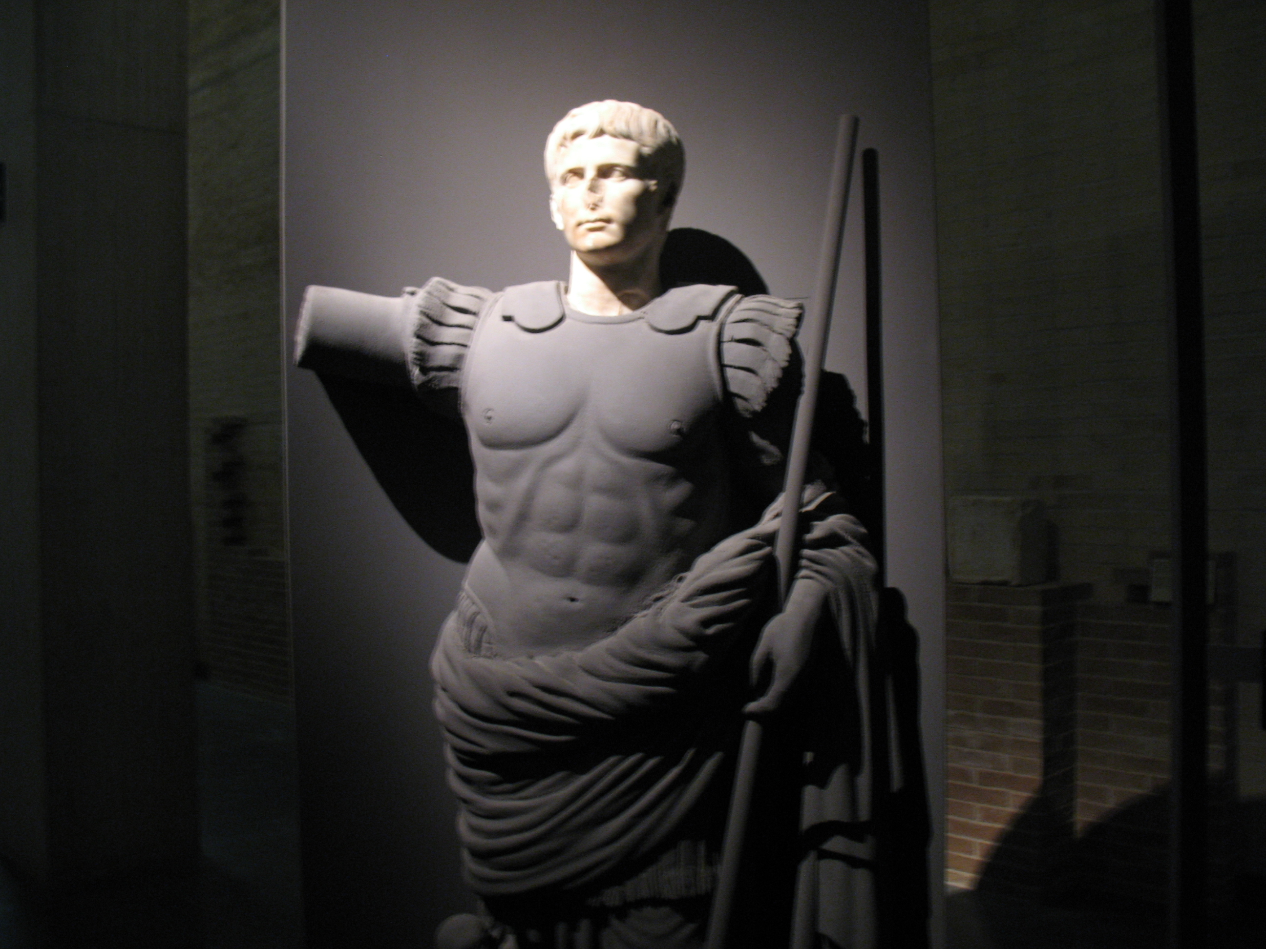 Statua parzialmente ricostruita rinvenuta nell'antica Teate Marrucinorum